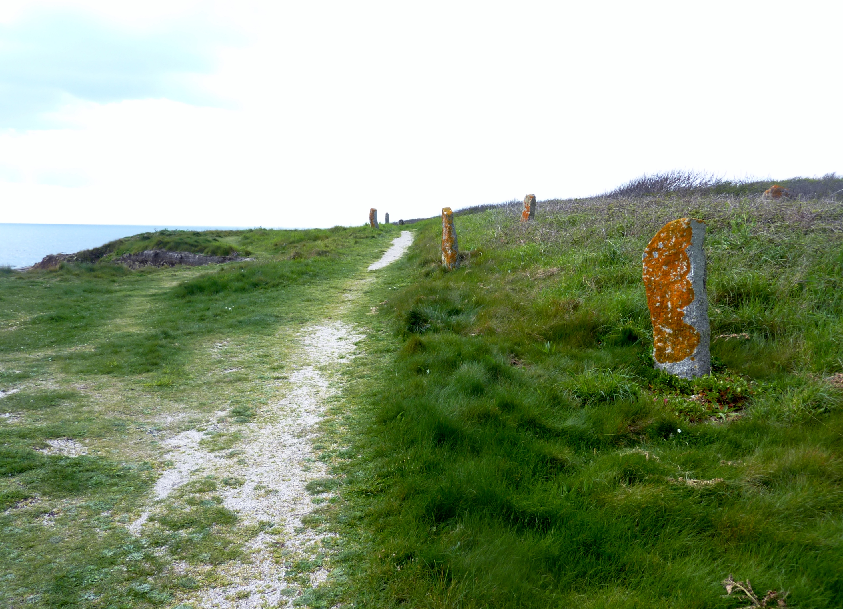 "Pierres debout" le long du sentier littoral GR 34 en arrière de la plage de Trévignon